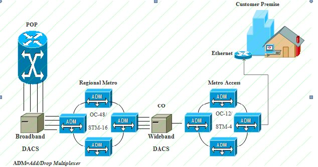 Монгол: Зураг 5-9: ADMs бүхий хотын SONET ring загвар.